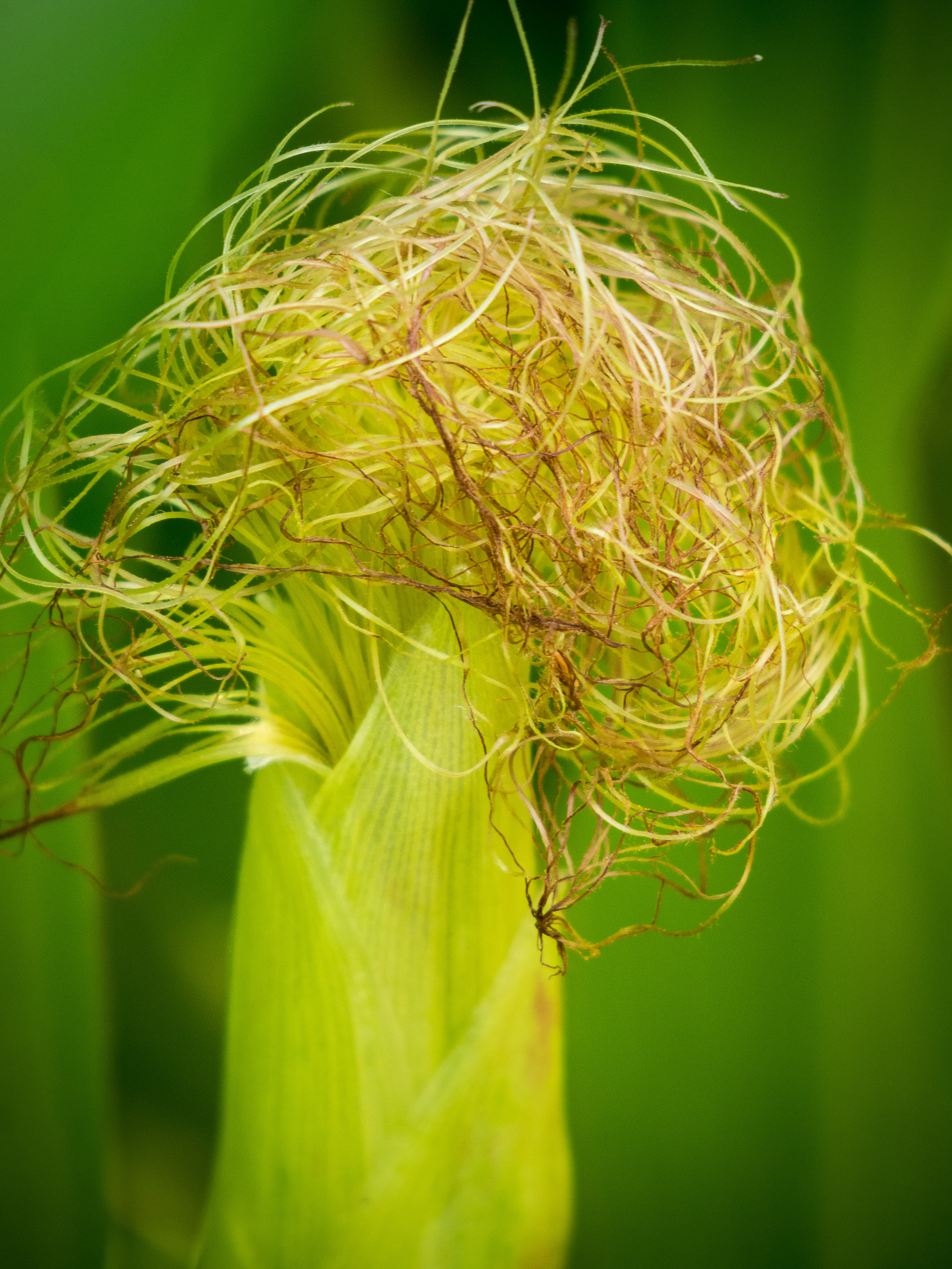 Der Zuckermais, Süßmais, lat. Zea mays, Narbenfäden